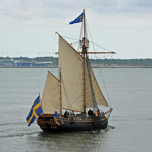 Foto: Mikael Johansson